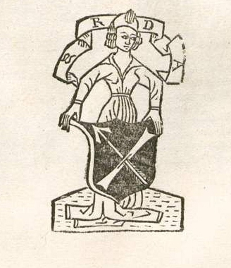 Jüngere Fassung der Druckermarke von Sixtus Riessinger (gest. 1506 oder später) Detail aus: Marianus de Cuccinis (Hrsg.): Decisiones Rotae Romanae. Band 1, Blatt 140 recto Rom: Georg Teutonicus und Sixtus Riessinger ca. 1483 GW 8205; ISTC No.: id00112000 Bayerische Staatsbibliothek Signatur: BSB-Ink D-87 Permalink